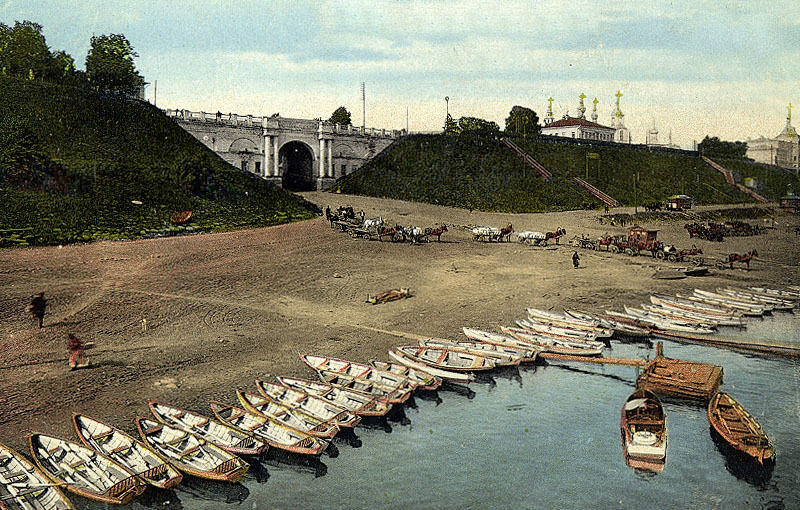 Старый Ярославль. Пристань возле Семёновского спуска